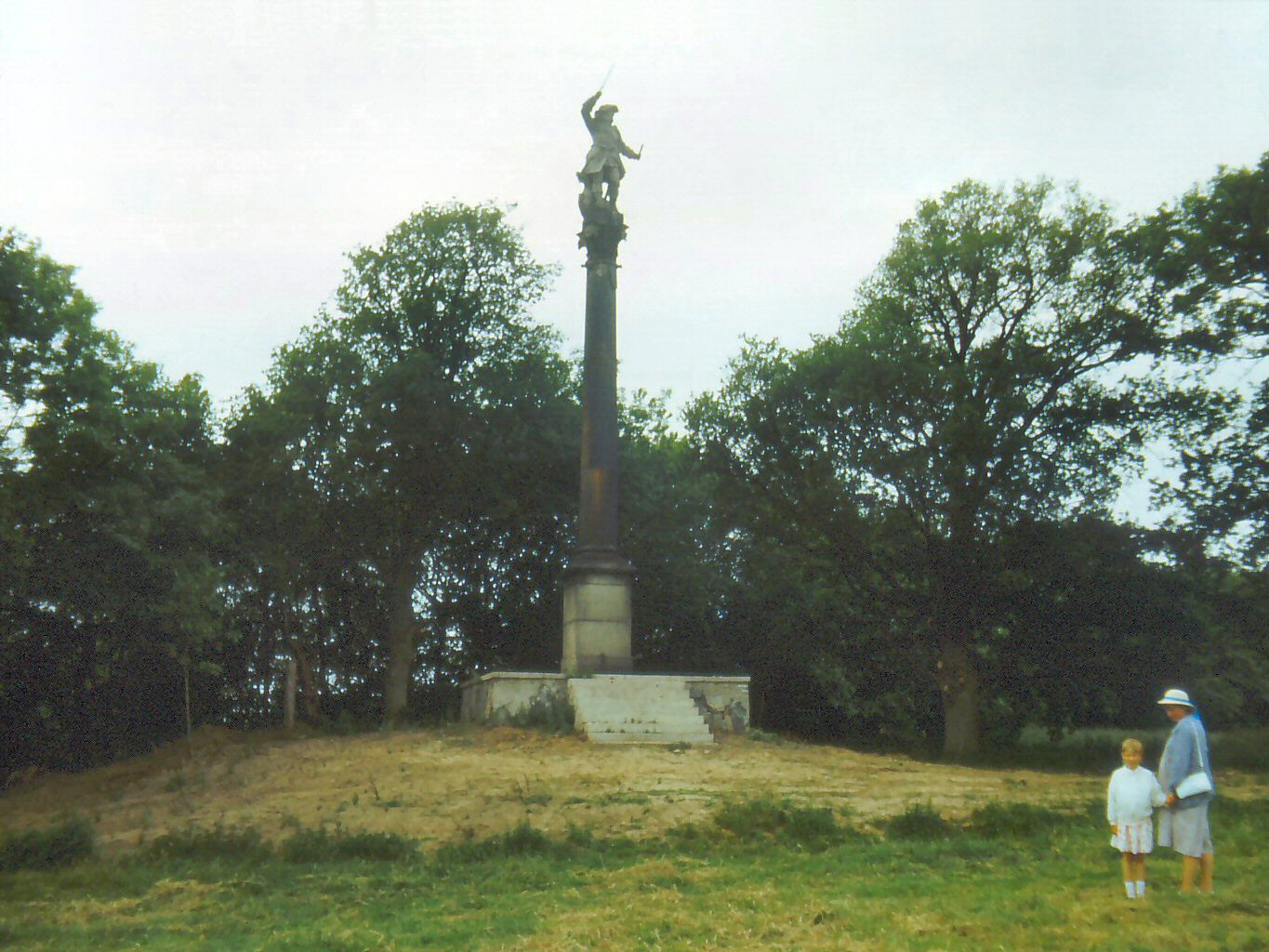 Preußensäule von 1854 bei Neukamp auf der Insel Rügen im Juli 1989